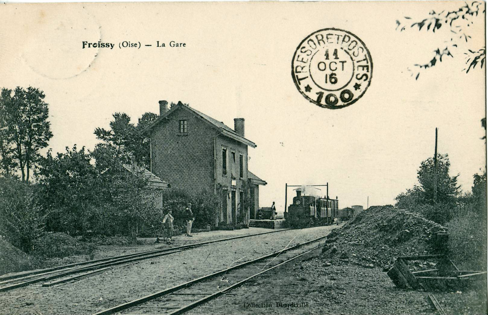 Carte postale ancienne éditée par Dhardivin FROISSY - La Gare Il s'agit d'une gare de la ligne de chemin de fer secondaire à voie métrique Ligne Estrées-Saint-Denis - Froissy - Crèvecœur-le-Grand, avec un train mixte sur la voie d'évitement. Oblitération Trésor et Postes du 11 octobre 1916 de la poste militaire.